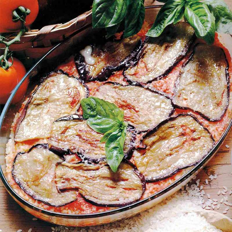 foto fatta da me